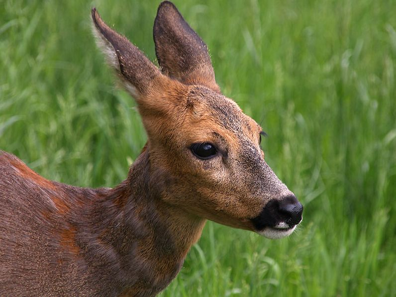 Reh in Detailansicht.